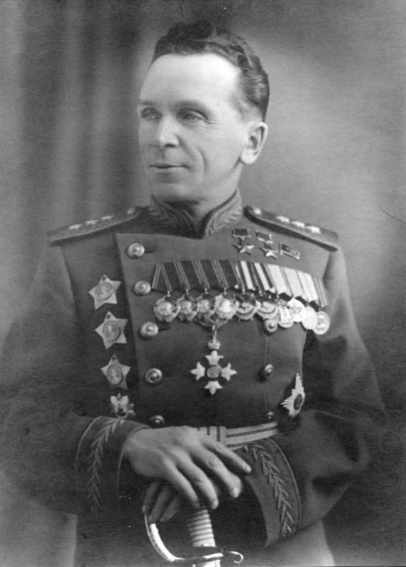 Павел Иванович Батов (1897 — 1985) — советский военный деятель, Генерал армии